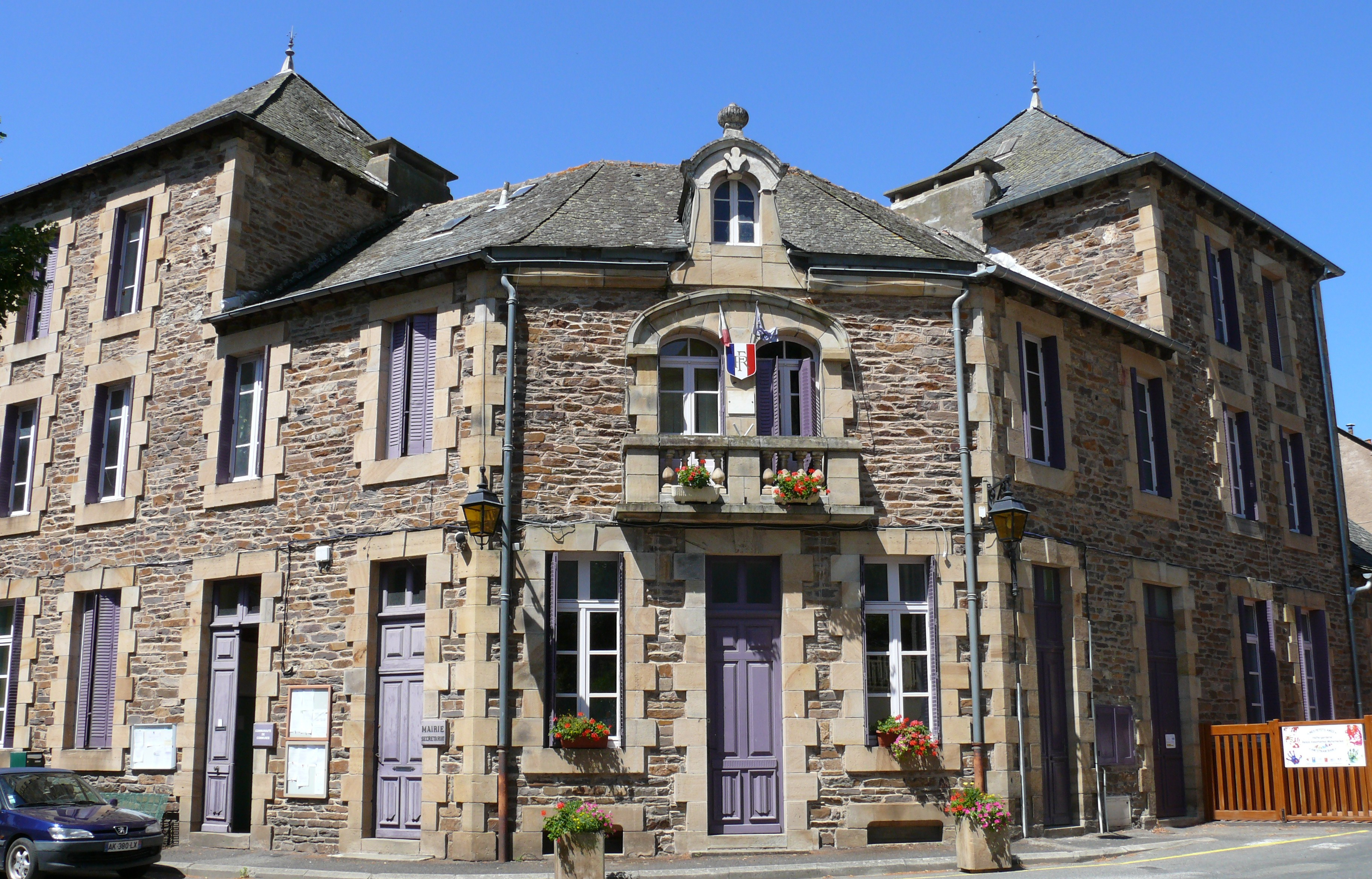 Coupiac - Mairie